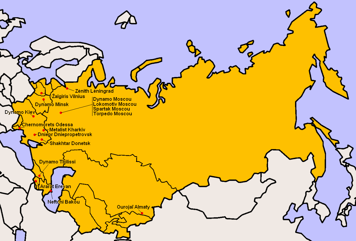 Clubs participants à la Division Supérieure 1988.